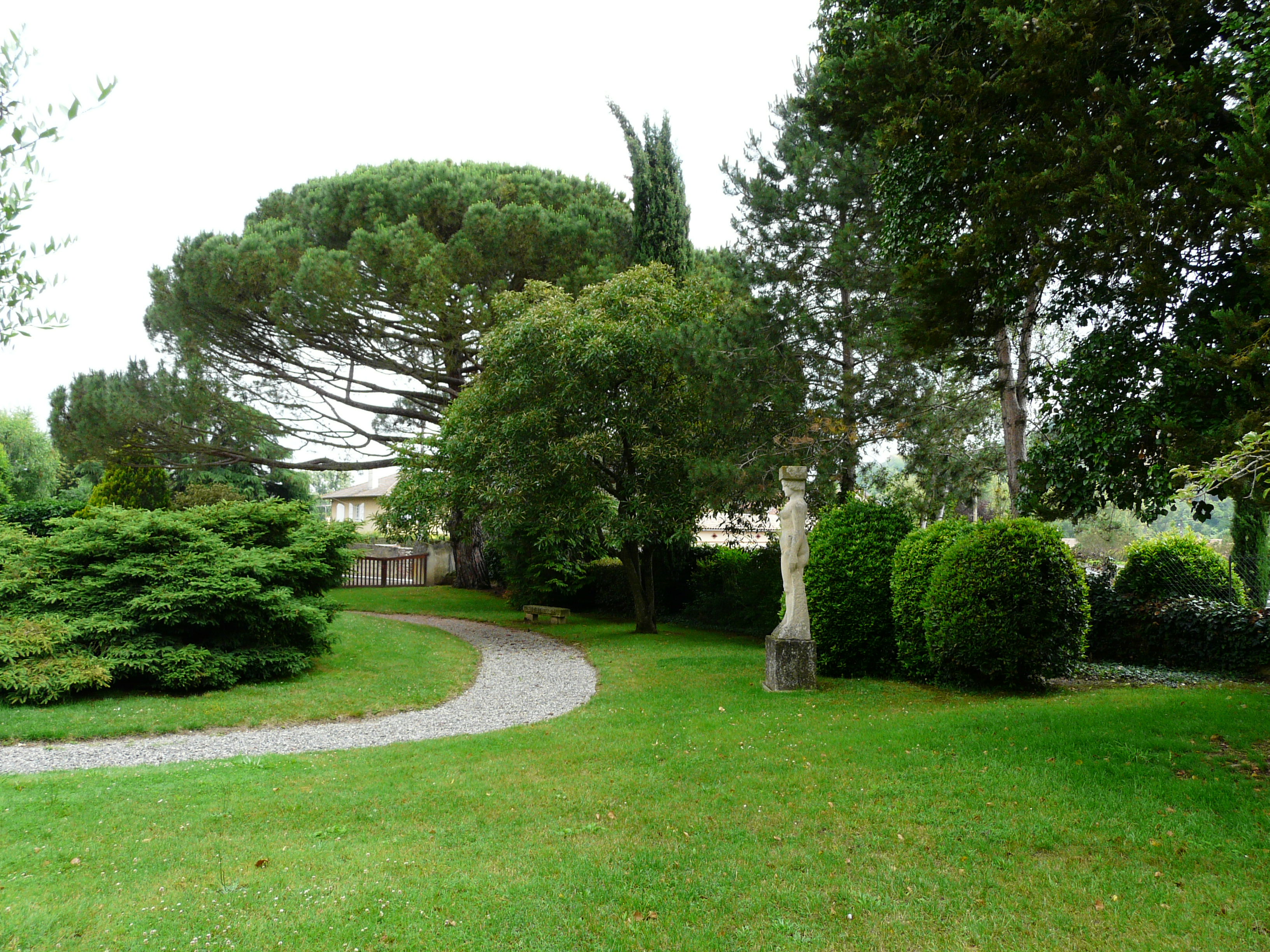 Le jardin du musée Abbal, Carbonne, Haute-Garonne, France.